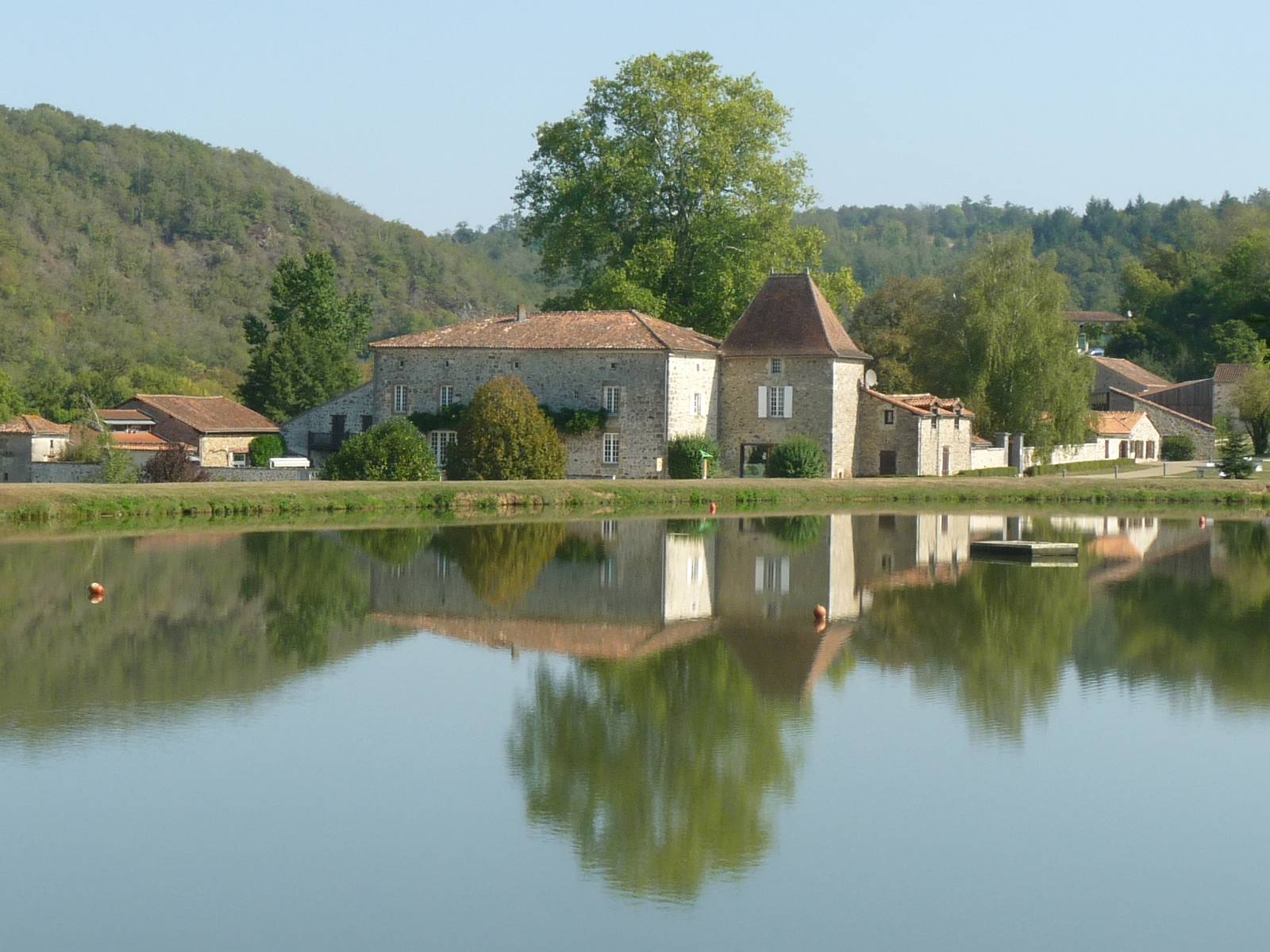 le Chambon, Eymouthiers (16), France